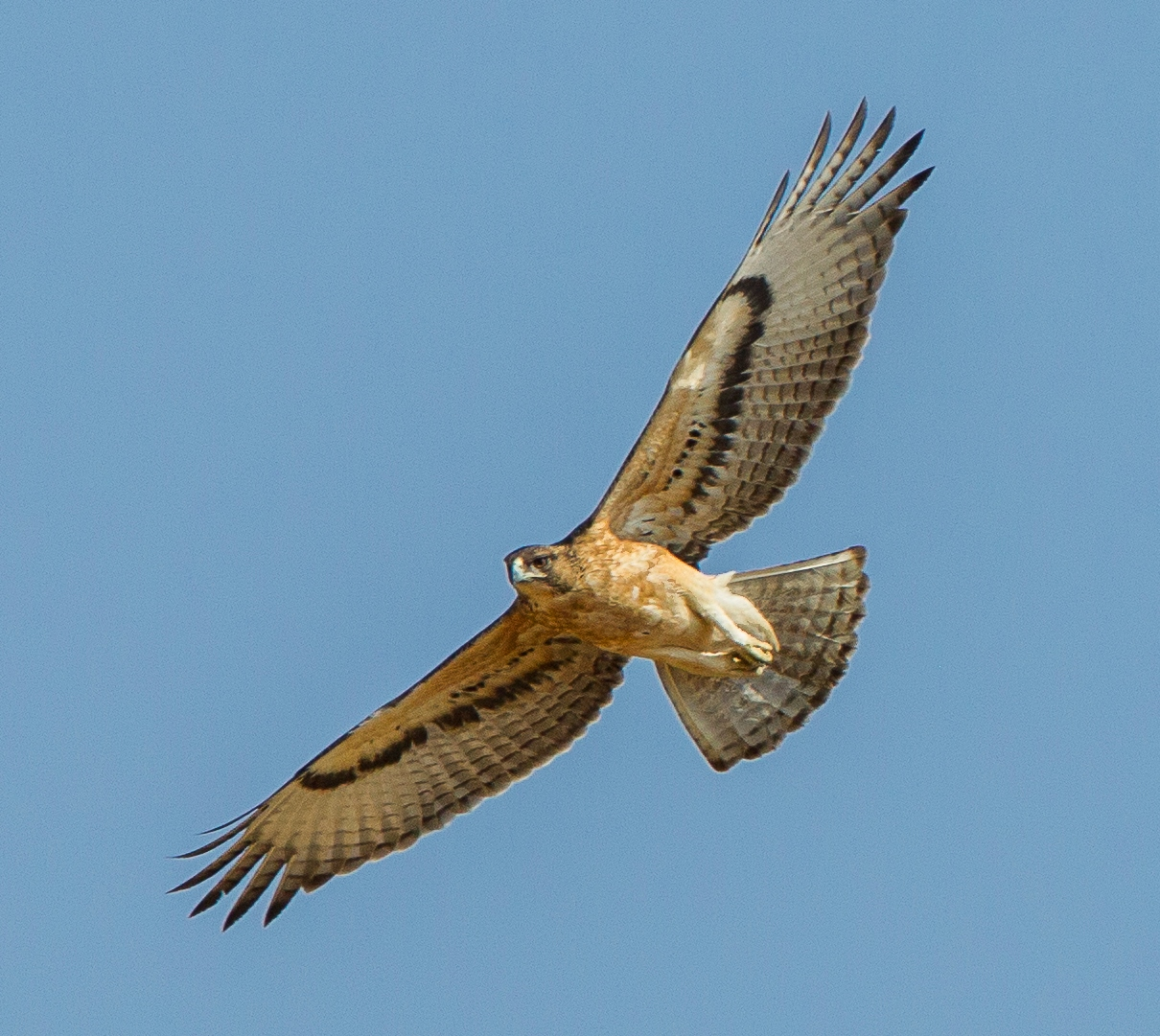 African Hawk-eagle - Samburu - Kenya_S4E4964